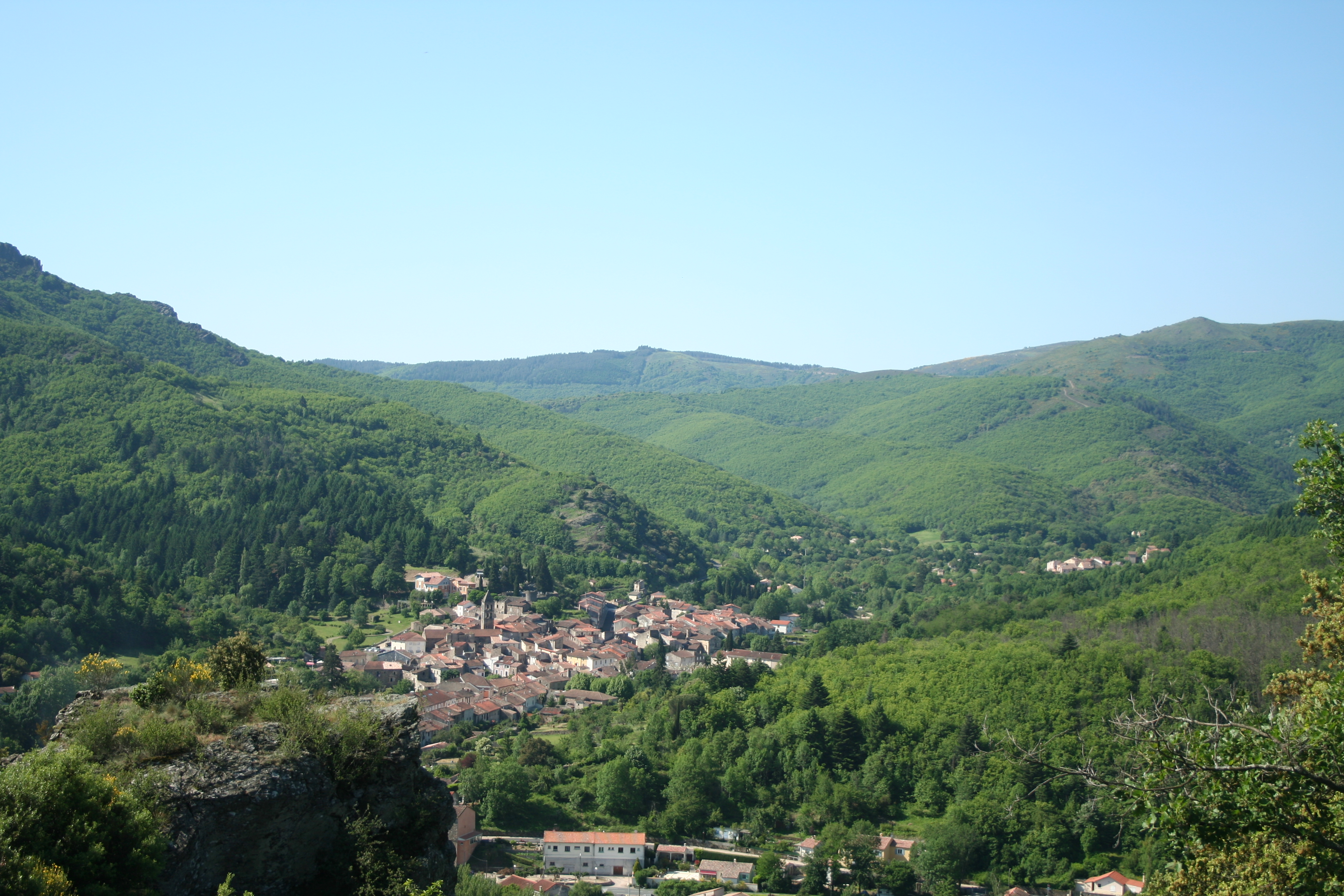 Saint-Gervais-sur-Mare (Hérault) - Vue sur Saint-Gervais depuis le clocher de Nayran. Sur la droite, hameau de Cours, commune de Rosis